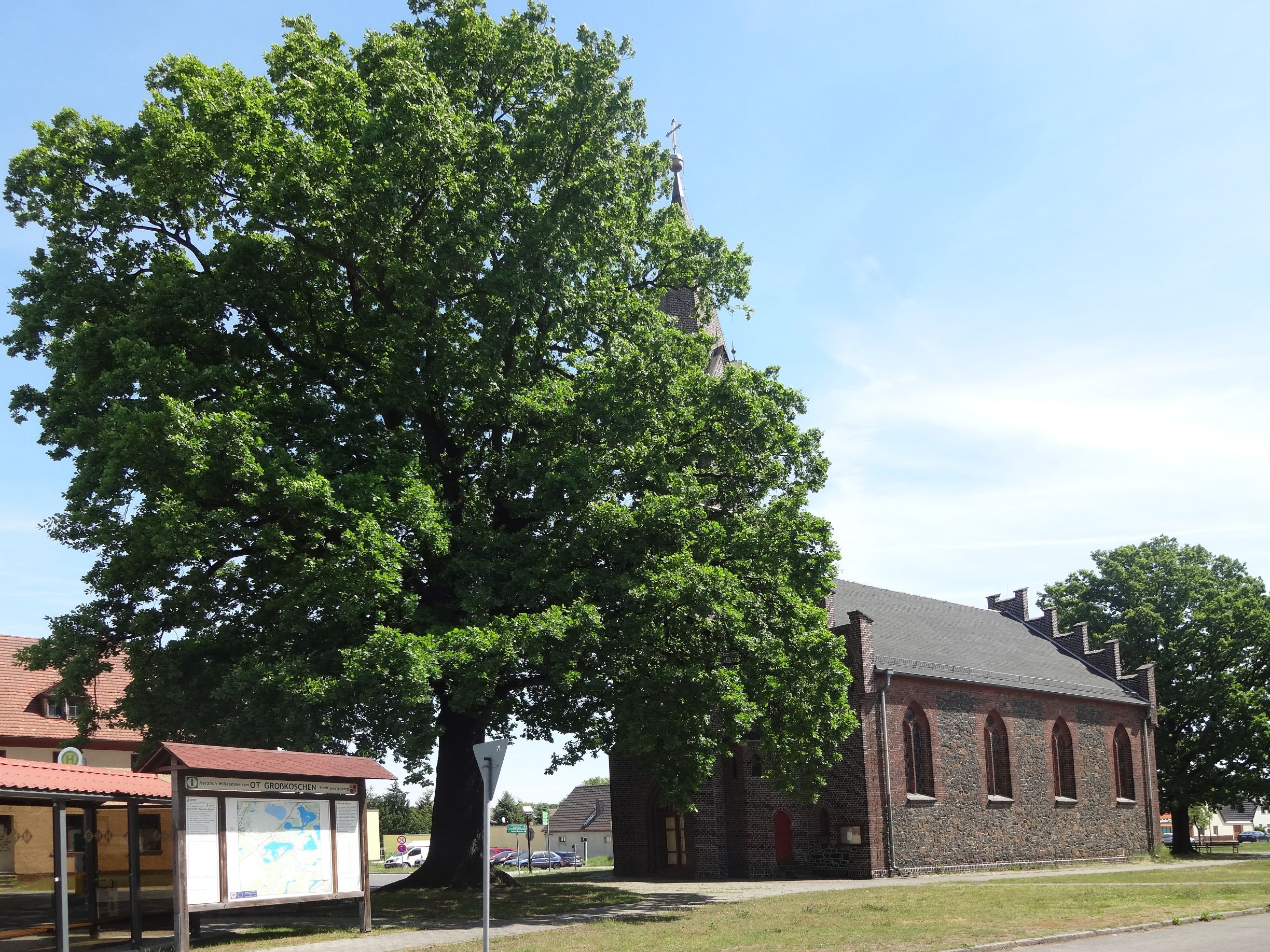 Naturdenkmal Stieleiche (Quercus robur) vor der Kirche in Großkoschen